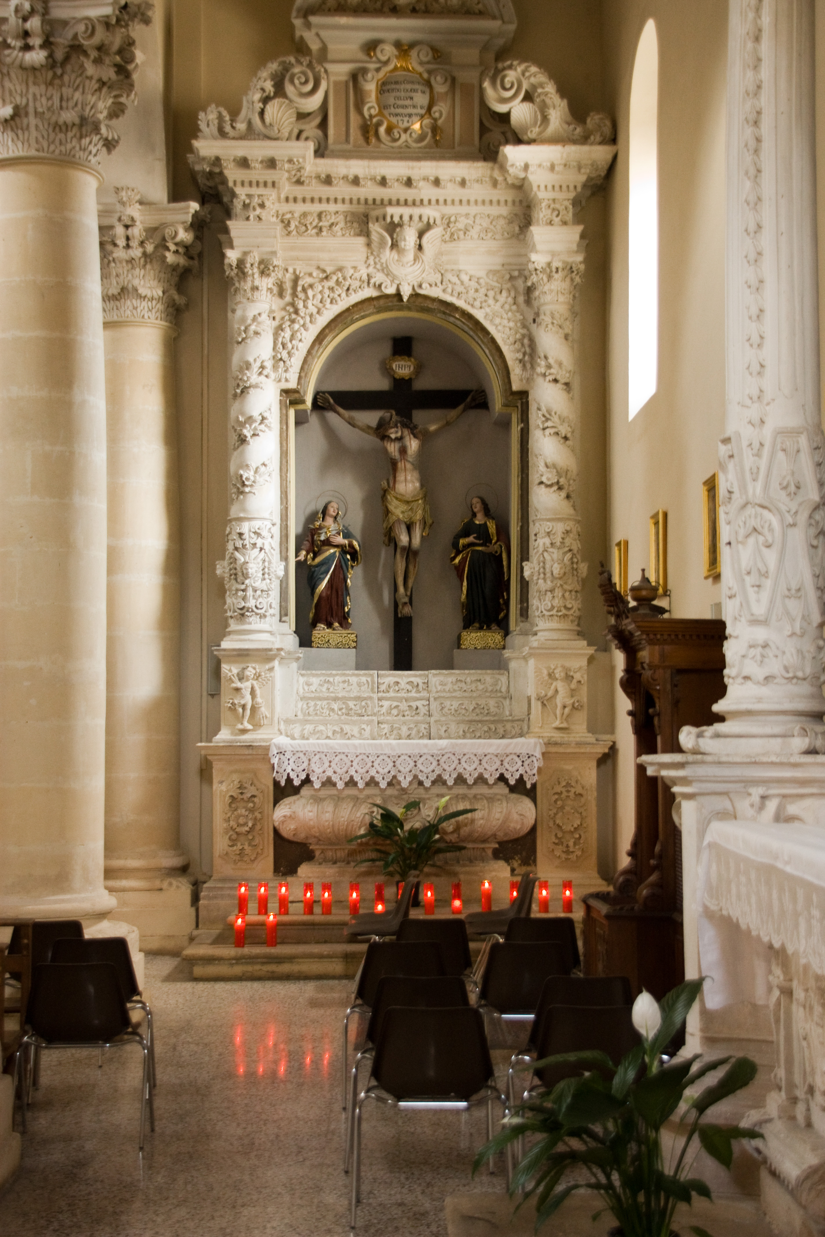 Chiesa Santa Maria dell'Idria, Ragusa Ibla, Sicile, Italie